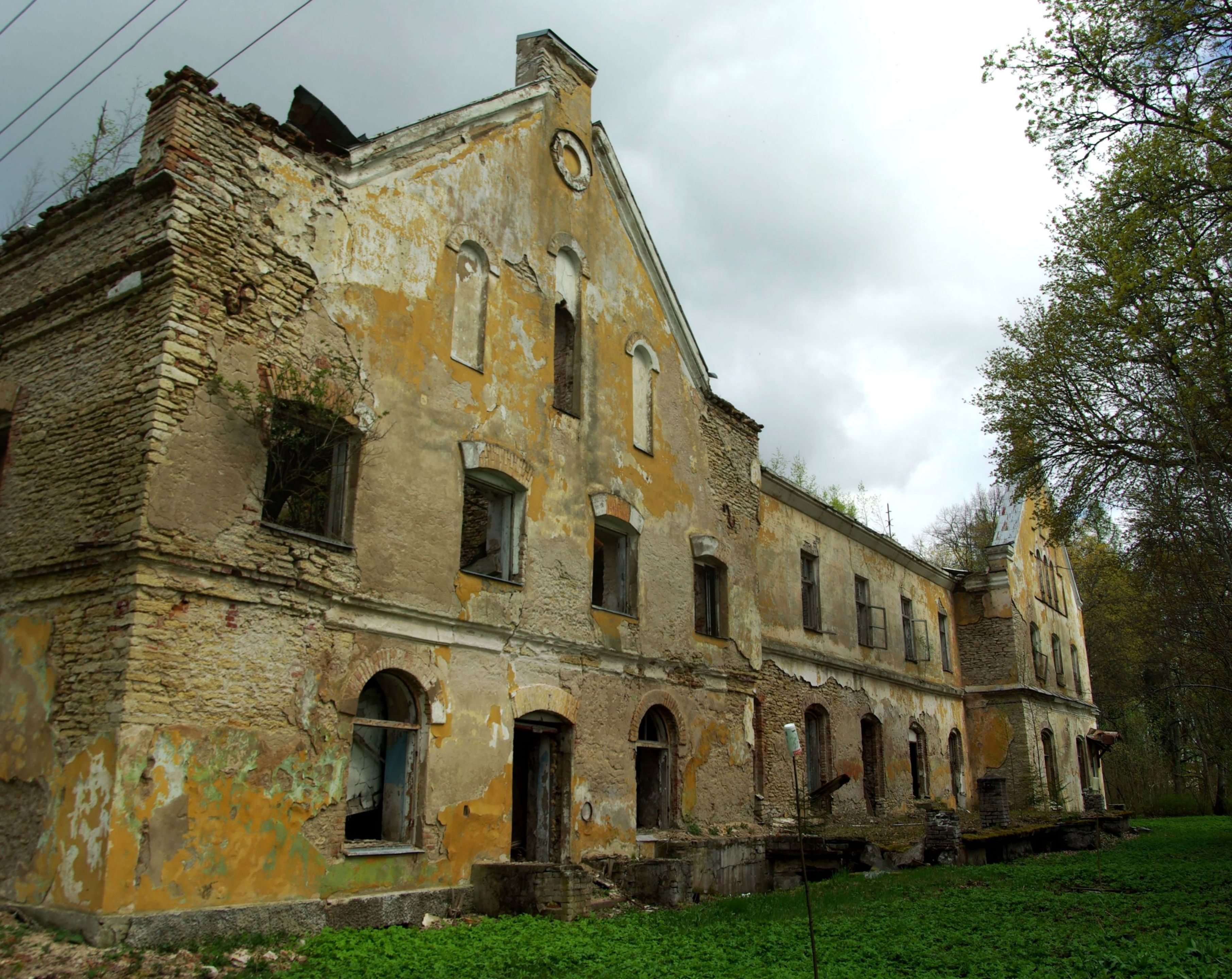 Aavere mõisa peahoone